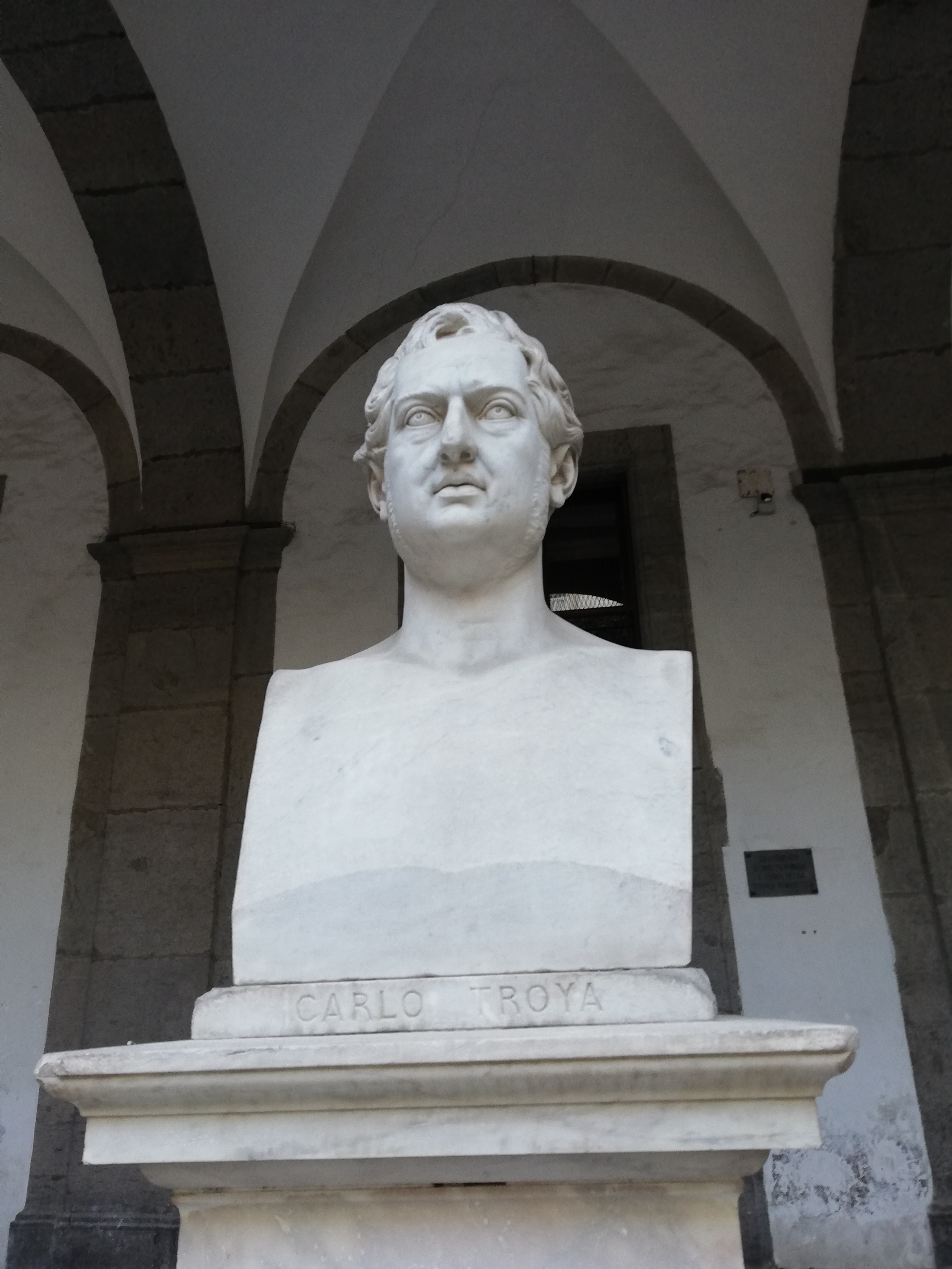 Busto di Carlo Troya nel Cortile delle Statue di Napoli